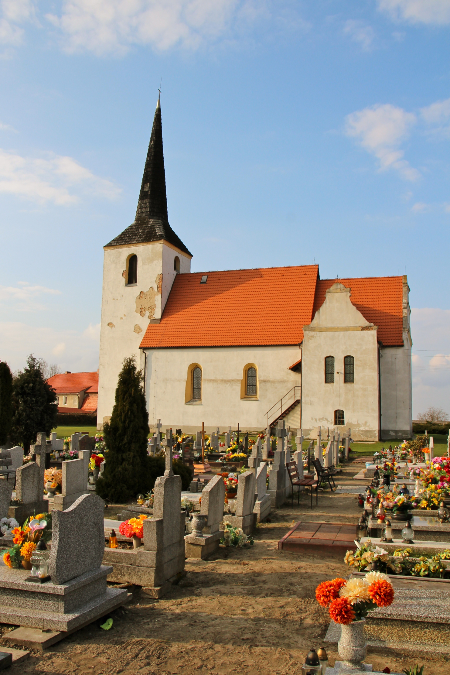 Buczyna – województwie dolnośląskim, w powiecie polkowickim, w gminie Radwanice.